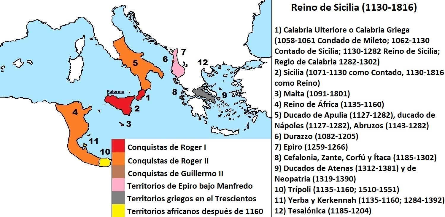 Storia del Regno di Sicilia